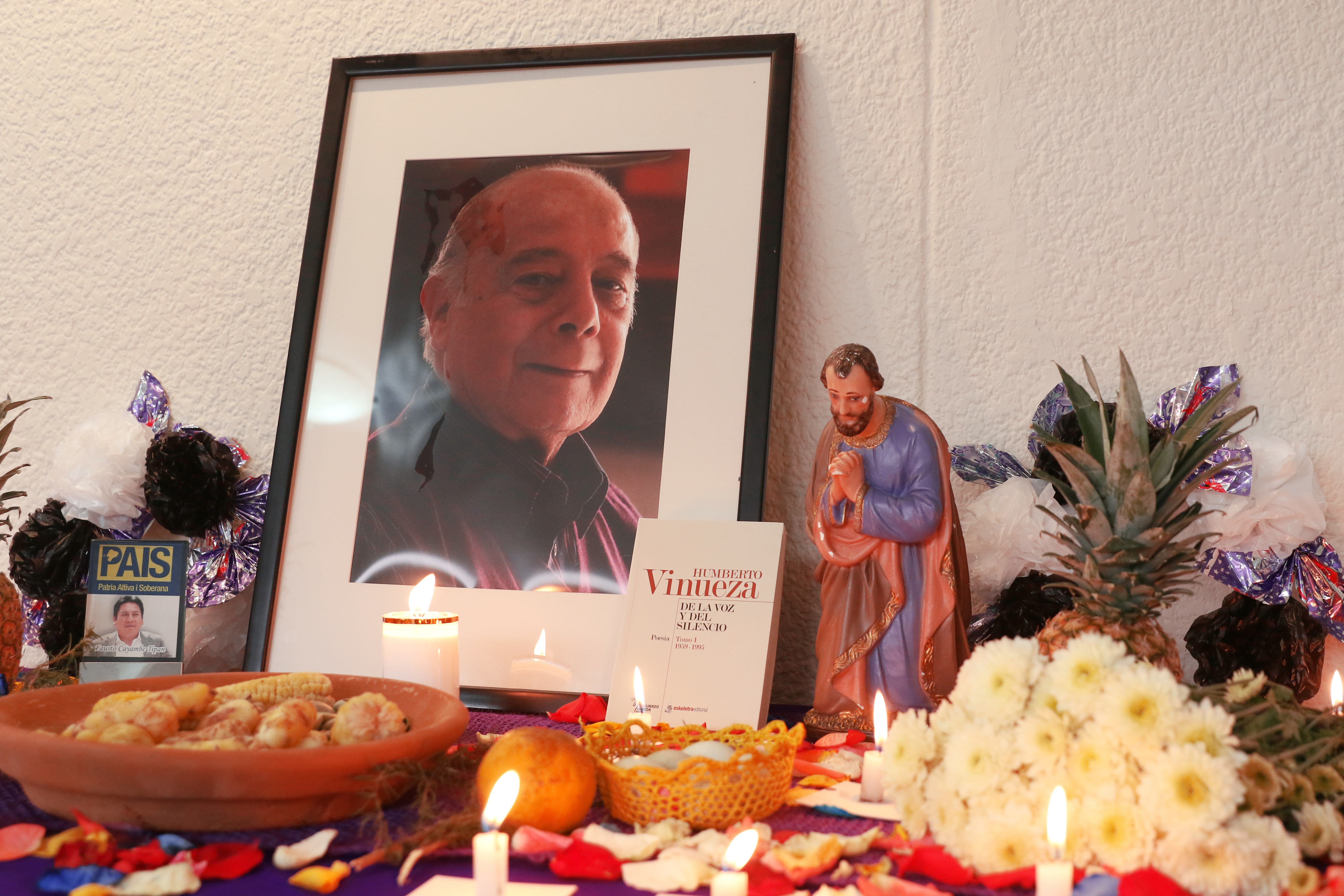 Quito, 1 noviembre de 2017 (Andes).- Dos altares de muertos, uno en honor al poeta ecuatoriano Humberto Vinueza, quien murió en marzo, y otro para el artista plástico mexicano José Luis Cuevas, que dejó este mundo en julio, fueron instalados en la Cancillería de Ecuador como parte de las celebraciones del Día de los Difuntos. ANDES/Micaela Ayala V. Quito, 1 noviembre de 2017 (Andes).- Dos altares de muertos, uno en honor al poeta ecuatoriano Humberto Vinueza, quien murió en marzo, y otro para el artista plástico mexicano José Luis Cuevas, que dejó este mundo en julio, fueron instalados en la Cancillería de Ecuador como parte de las celebraciones del Día de los Difuntos. ANDES/Micaela Ayala V.